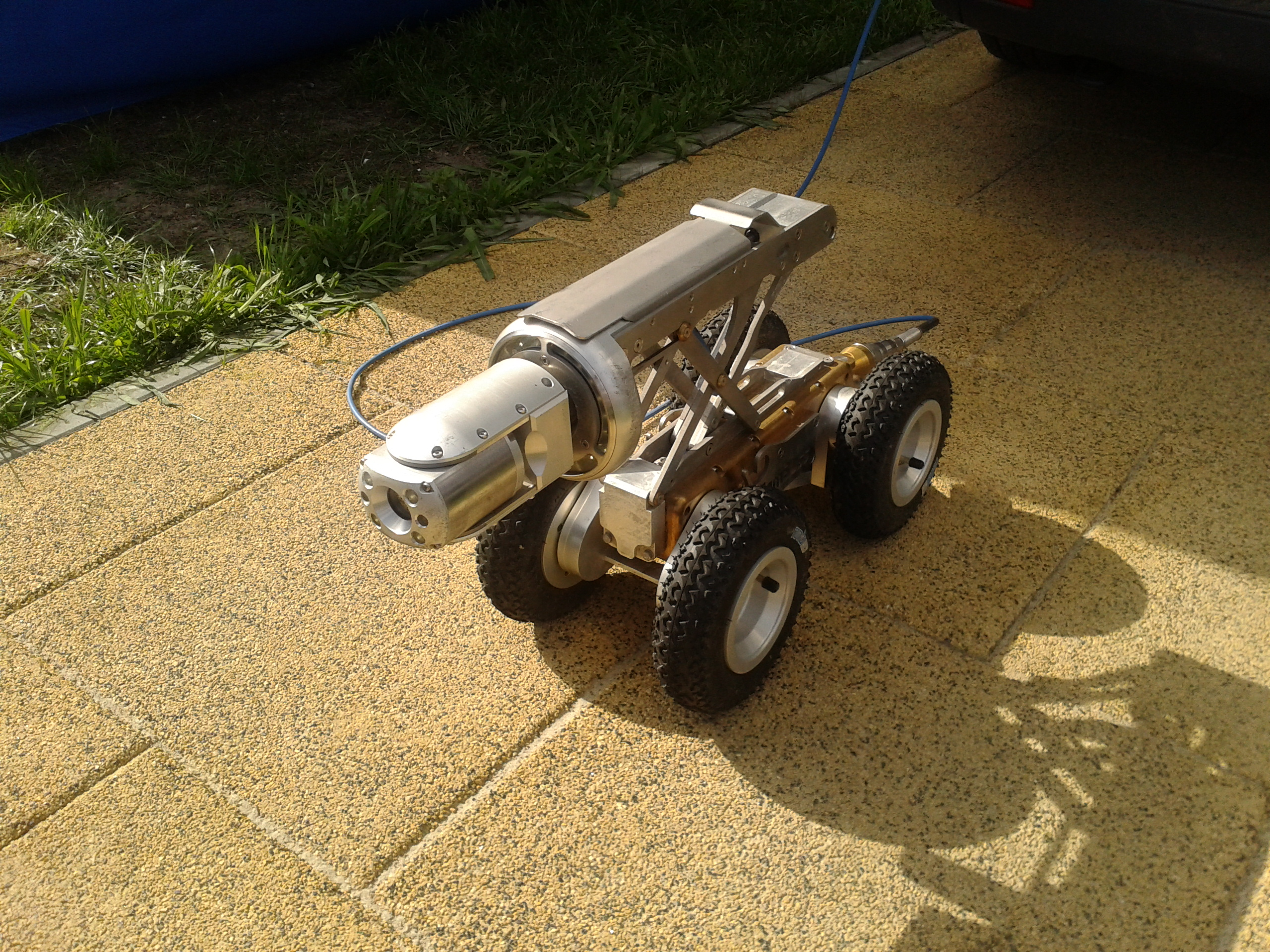 Robot zwiadowczy z kamerą, na stoisku Telewizyjnej Inspekcji Sieci Kanalizacyjnej w Toruniu - Toruńskie Pogotowie Wodno-Kanalizacyjne, Toruńskie Wodociągi podczas obchodów Święta Miasta Torunia 21 czerwca 2014 roku, które odbywało się w części Bulwaru Filadelfijskiego między mostem Józefa Piłsudskiego a przystanią AZS zasięg pracy/kabla robota 300 metrów